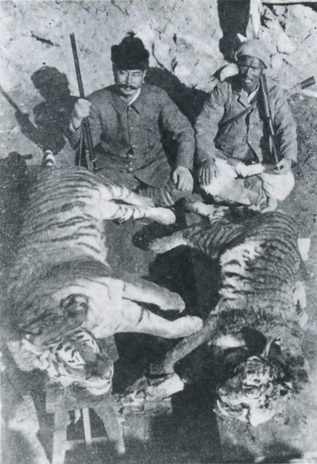 朝鮮で狩った虎を前にした山本唯三郎。